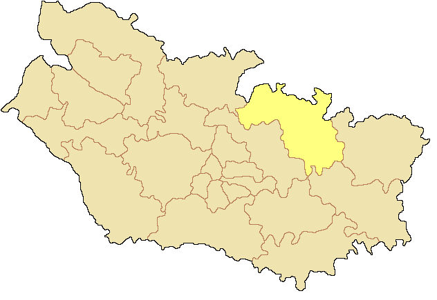 Canton d'Albert dans le département de la Somme